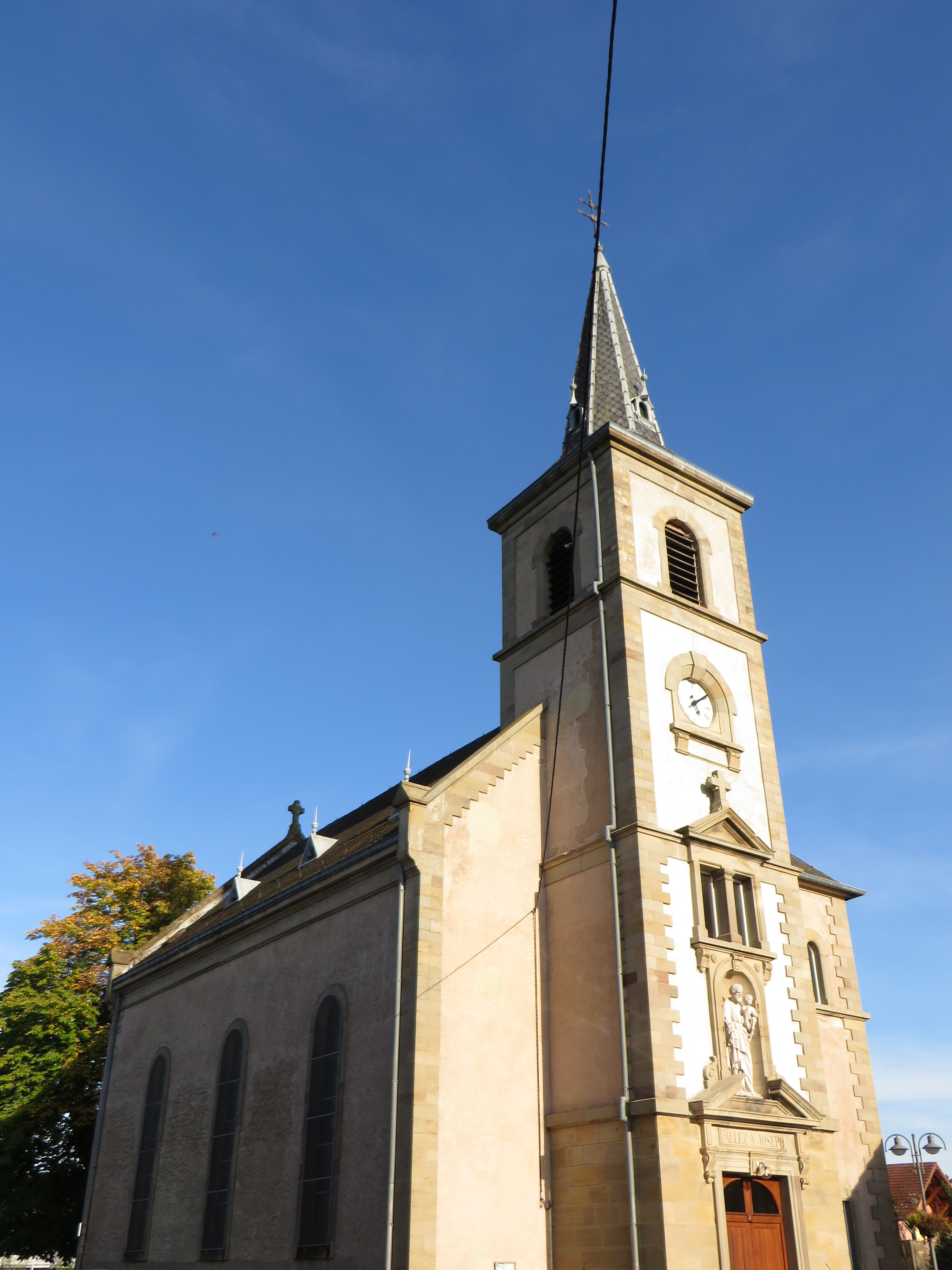 Hermelange eglise